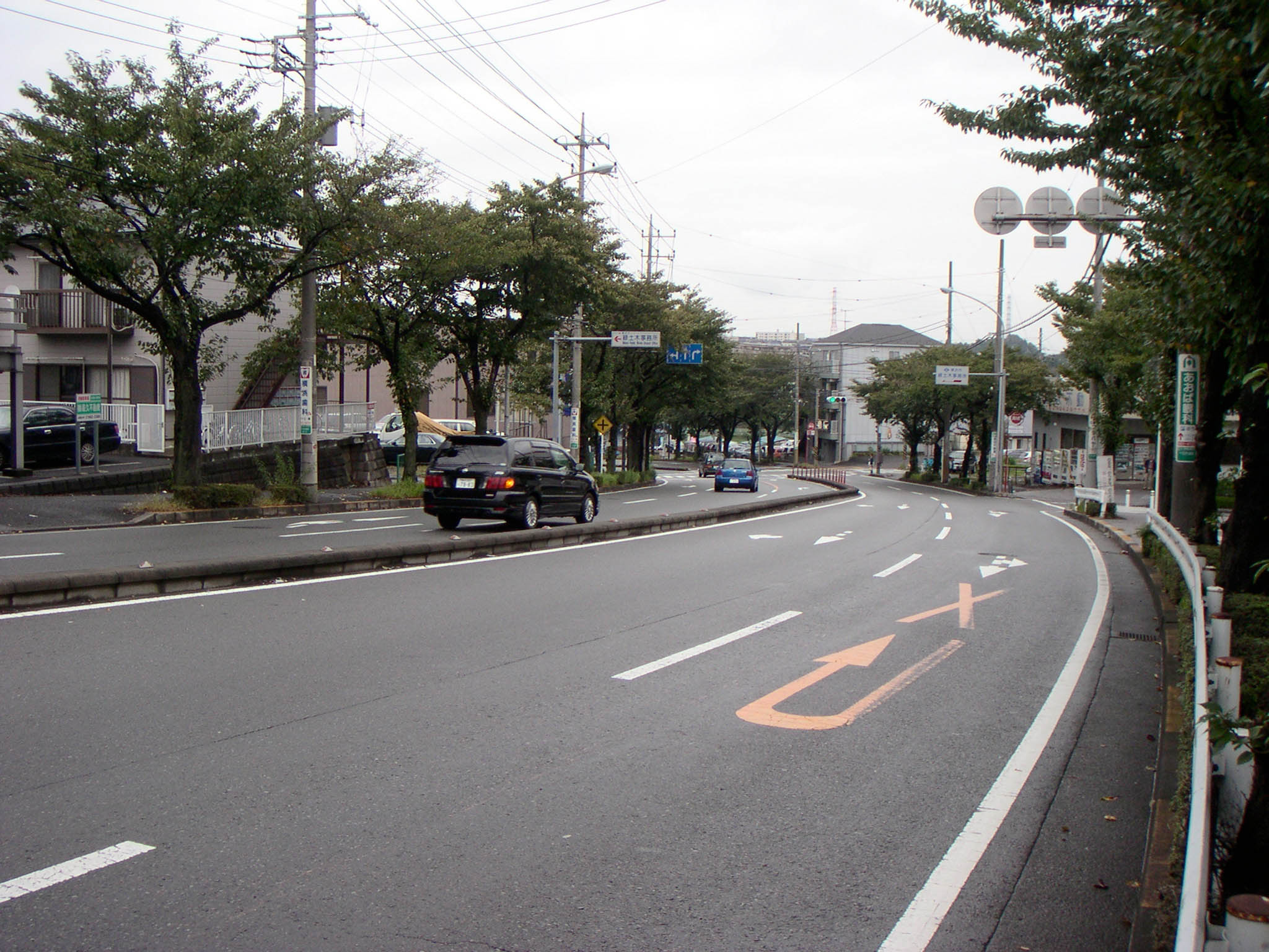 Loop 4, Yokohama, Kanagawa; near Tokaichiba Station, JR